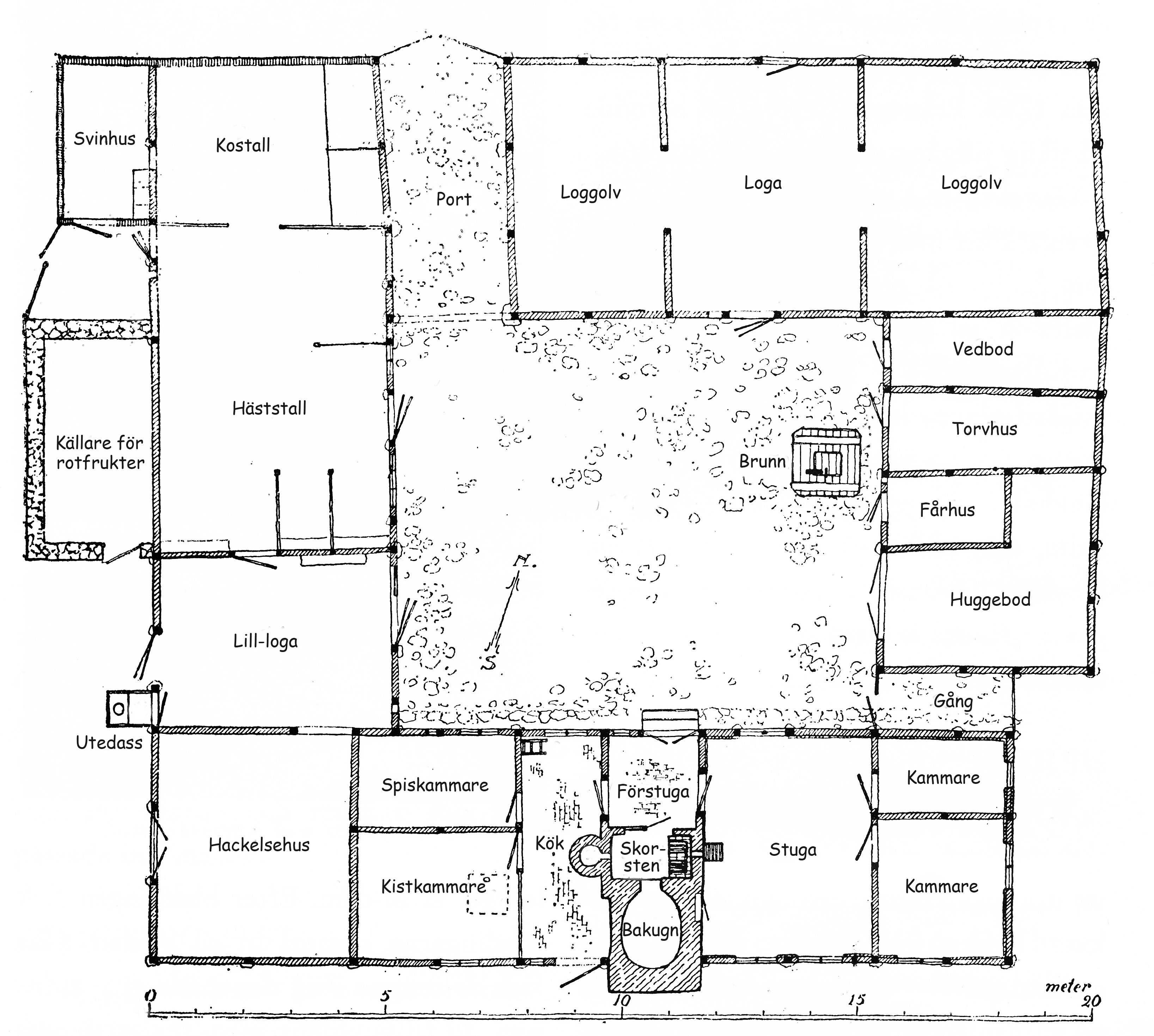 Byagården i Tomelilla, Skåne.